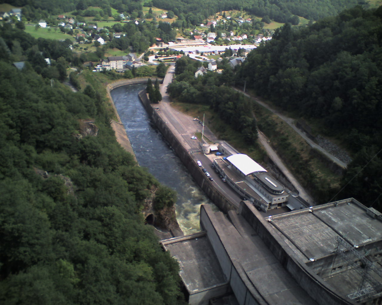 Vue sur le barrage et sur une partie de la ville de Bort-les-Orgues en Corrèze